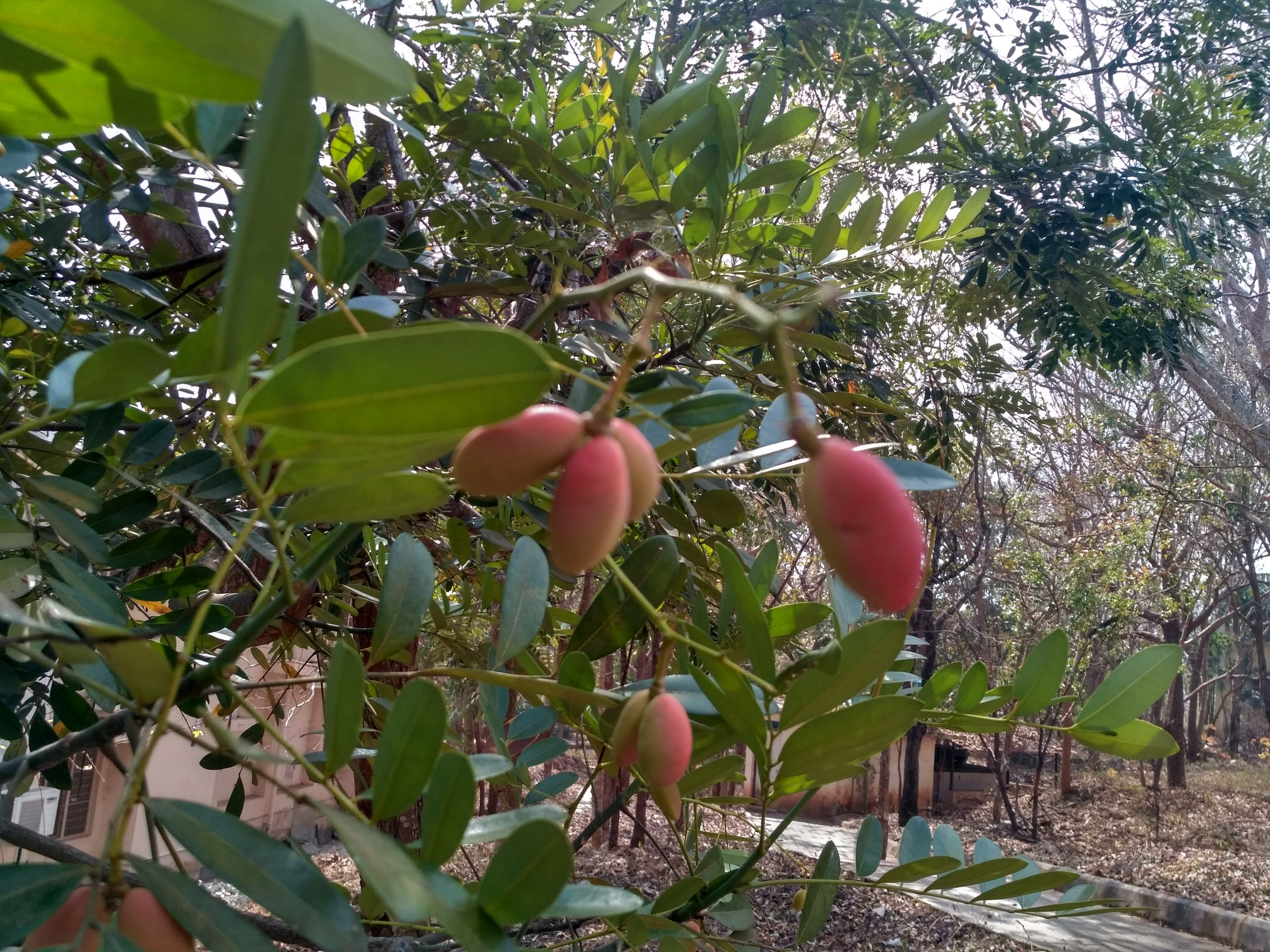 simarouba glauca